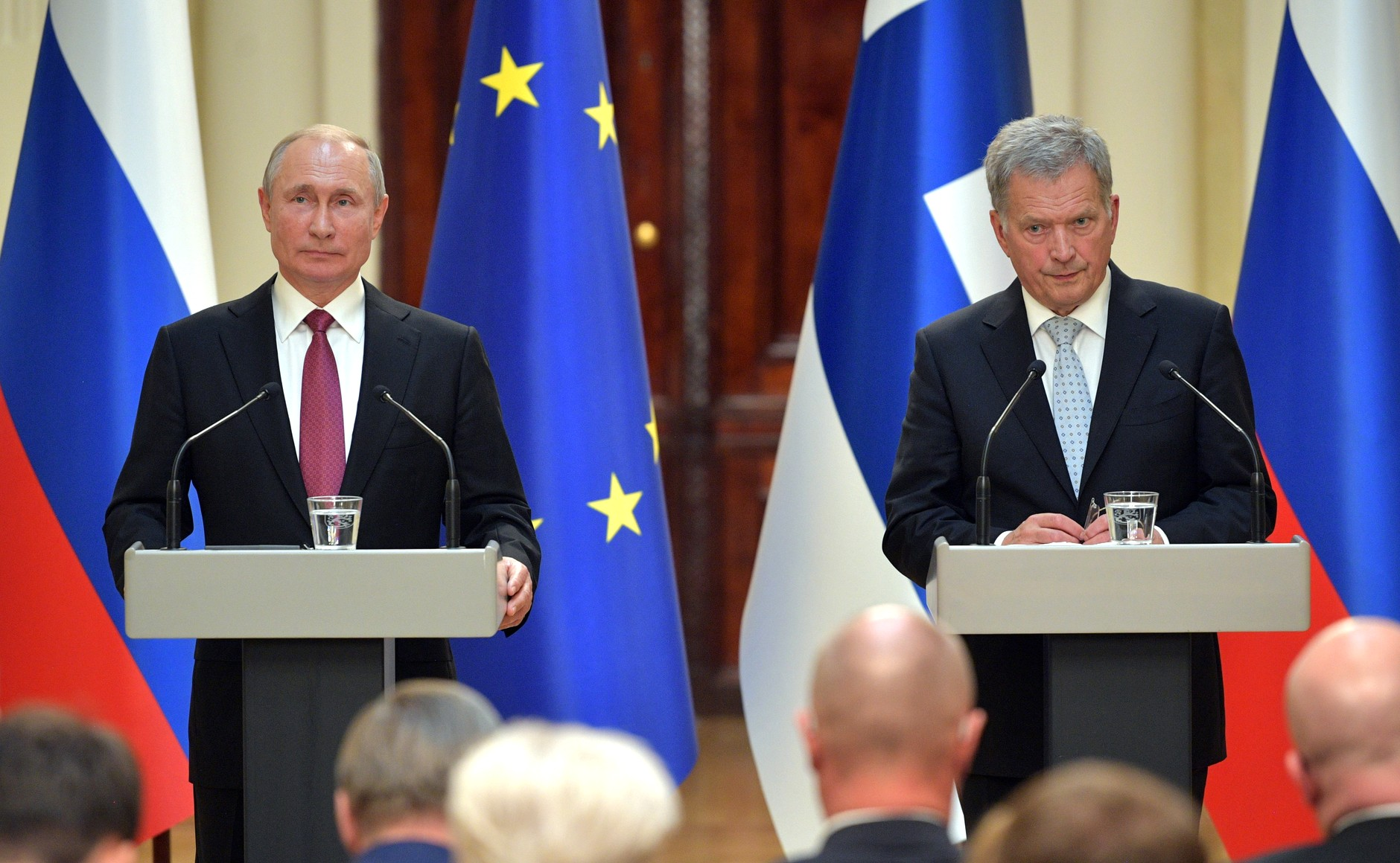 Российско-финляндские переговоры 21 августа 2019, Хельсинки